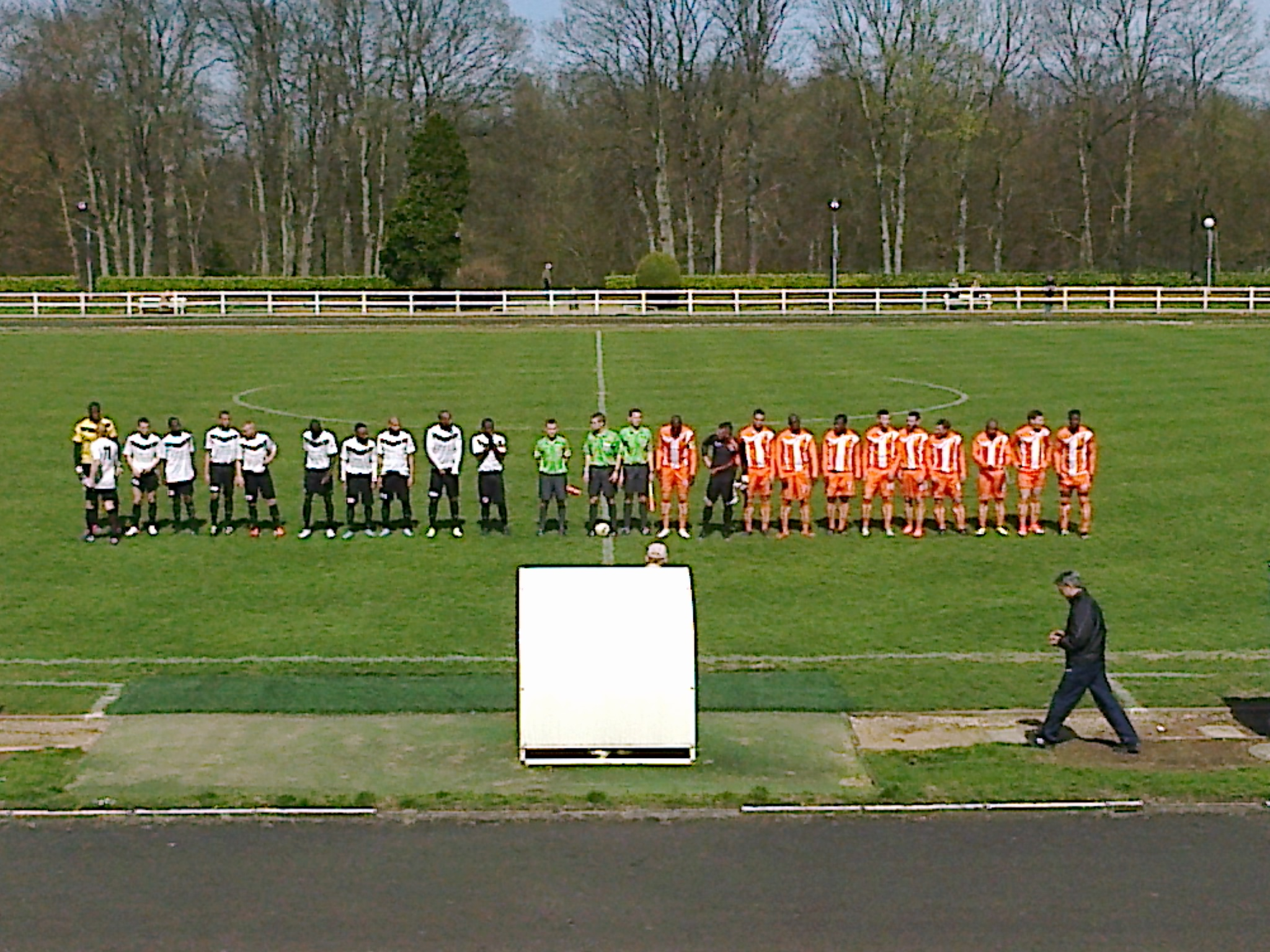 Présentation des équipes lors du match AC Boulogne-Billancourt - Les Mureaux du 14 avril 2013 au stade Marcel-Bec de Meudon